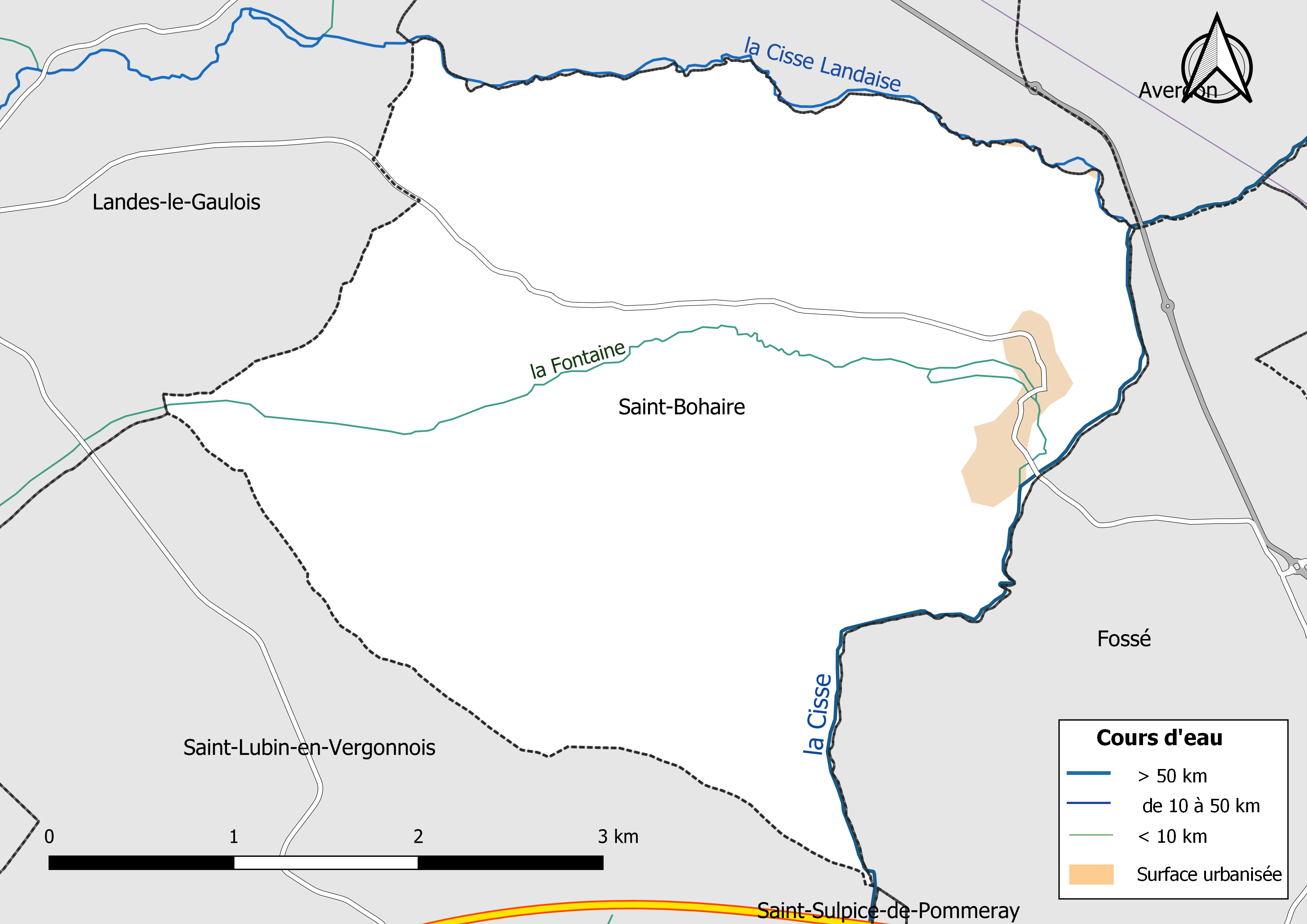 Carte du réseau hydrographique de la commune de Saint-Bohaire (Loir-et-Cher, France).